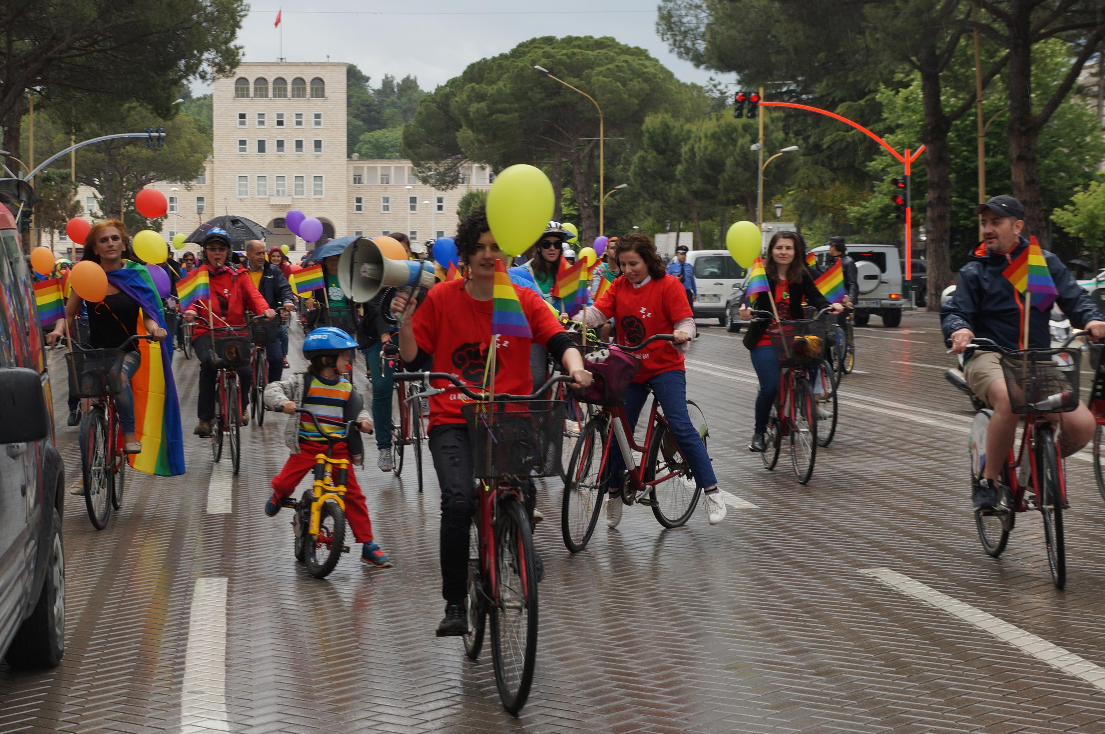 Tirana Gay (P)Ride 2016